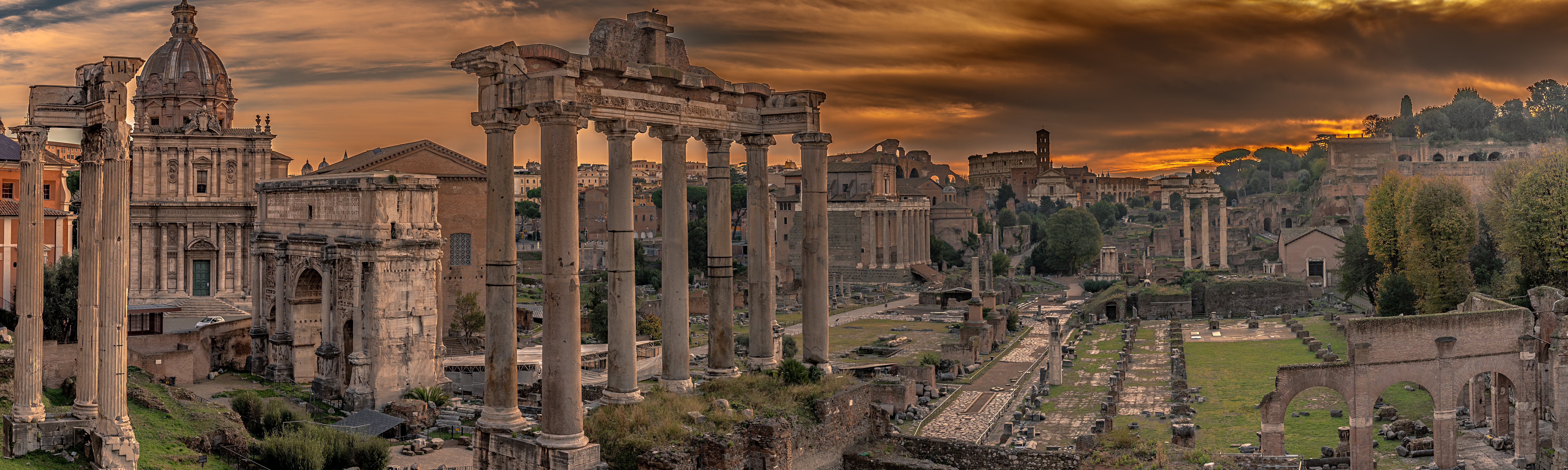 Das Forum Romanum im November 2018